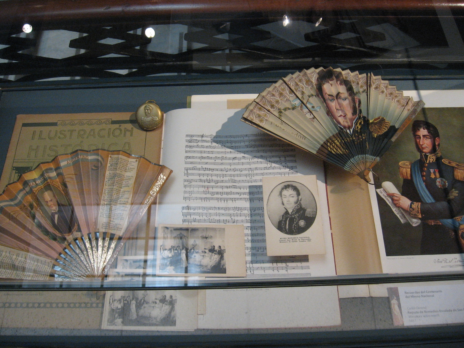 Partitura del Himno Nacional Argentino